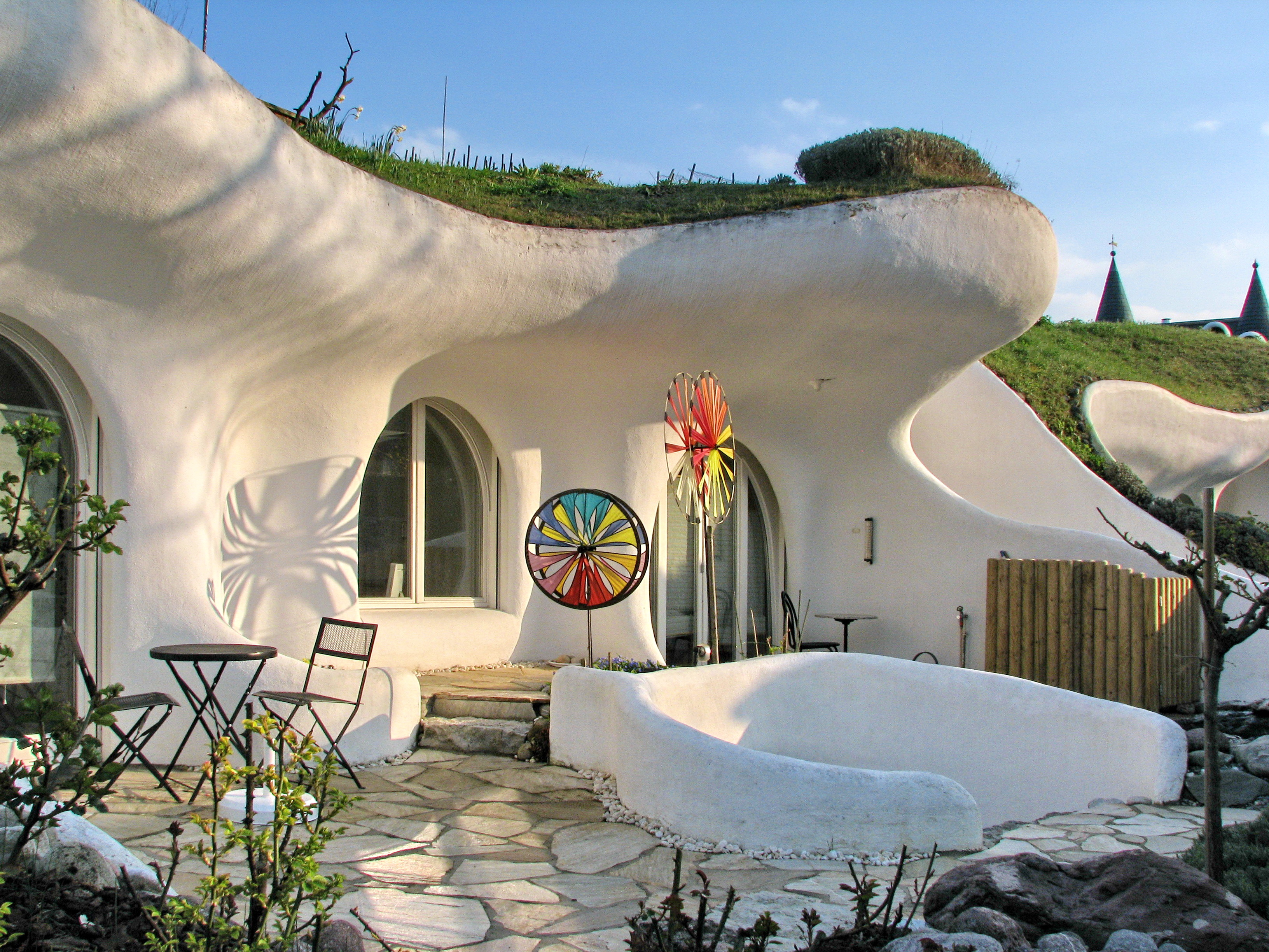 Earth house estate Lättenstrasse in Dietikon (Switzerland) by Peter Vetsch